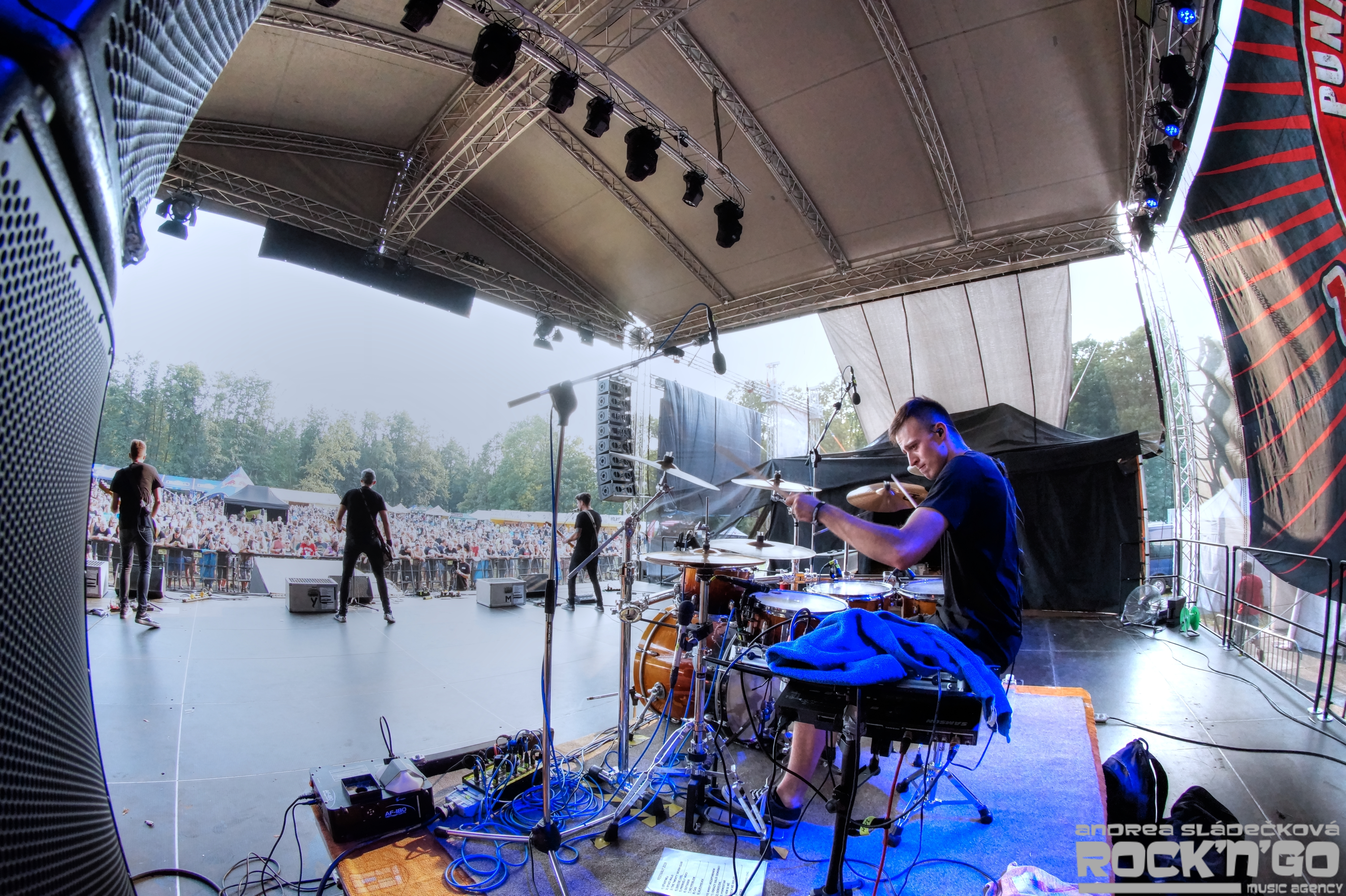 Koncert - Motosraz Lužany 2019